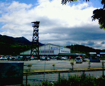 ボートピアなんぶ（場外舟券発売場：青森県ja:三戸郡ja:南部町）